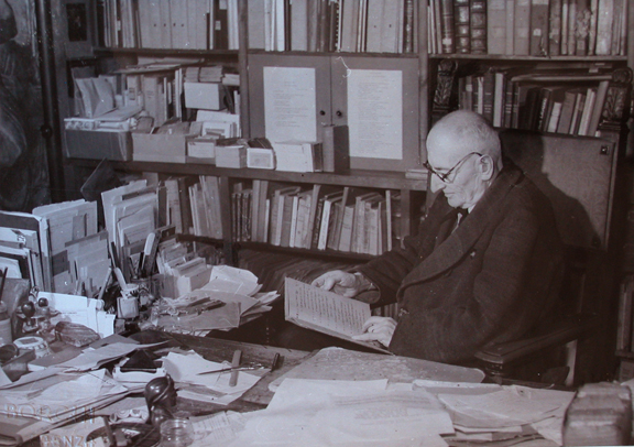 Gaetano Ballardini al lavoro nel suo studio al Museo.